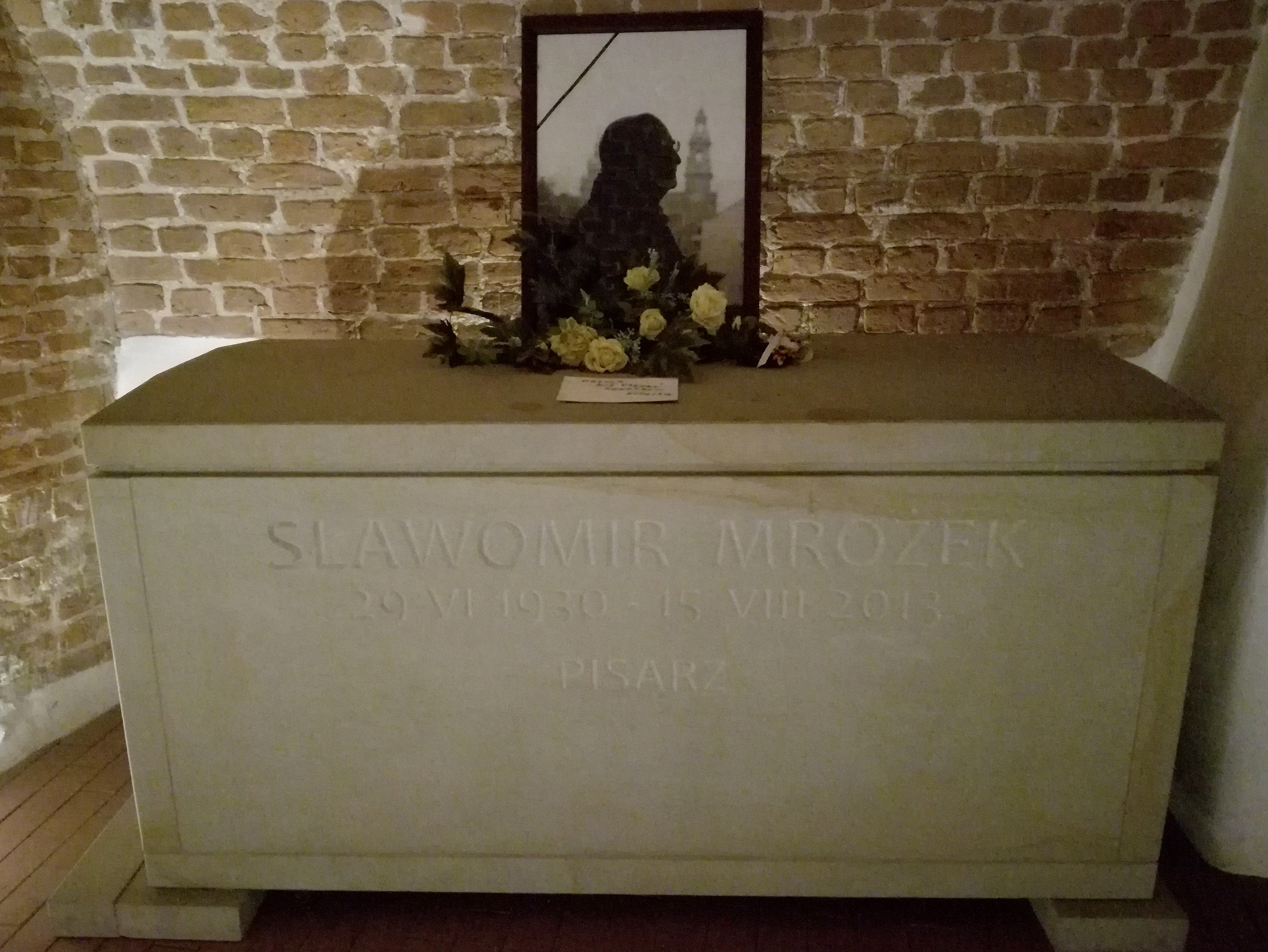 Sarkofag z prochami Sławomira Mrożka w krypcie kościoła pw. świętych Piotra i Pawła w Krakowie